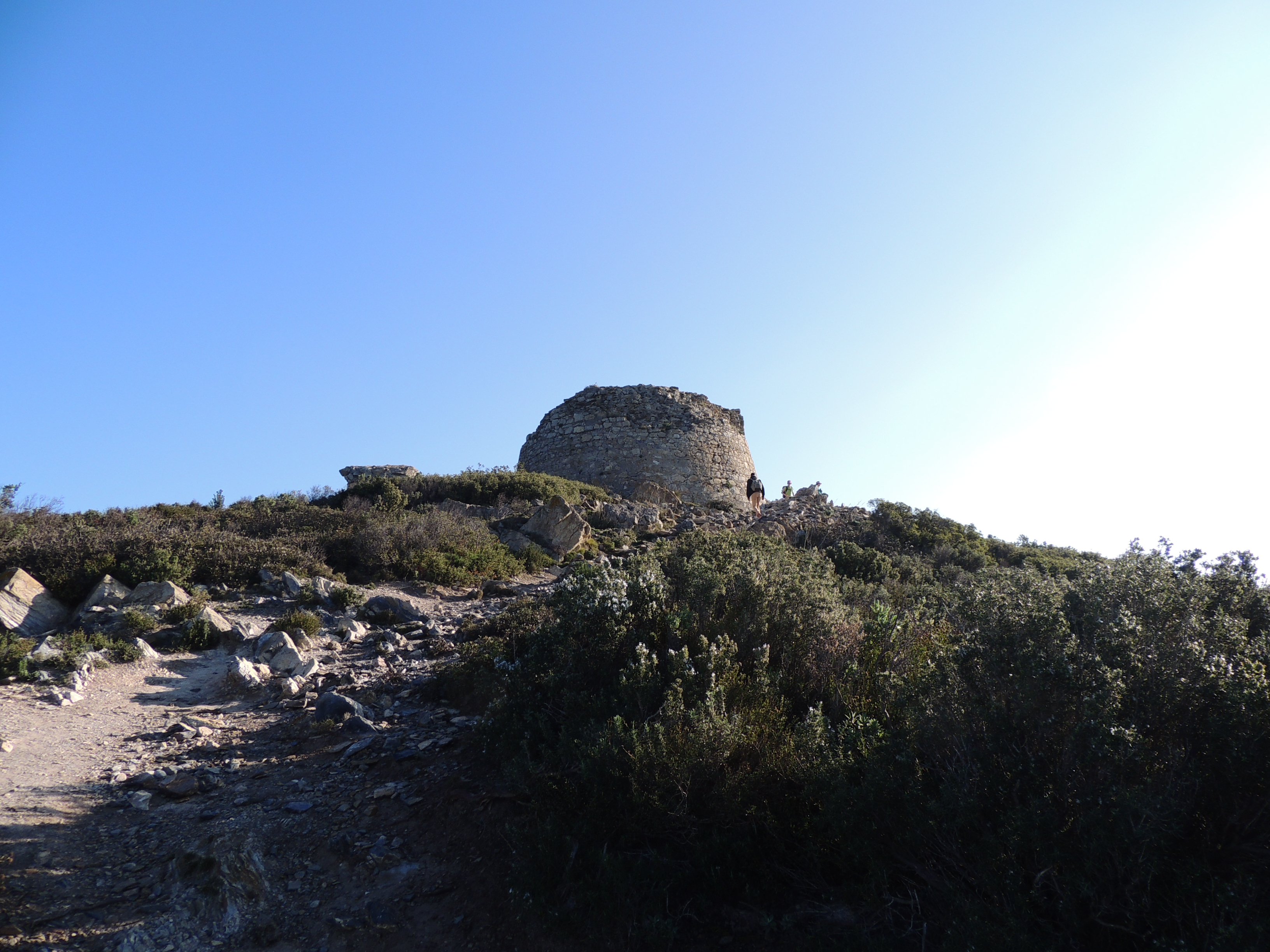 Torre que se situa en el punto mas elevado de la peninsula del cabo Norfeu.